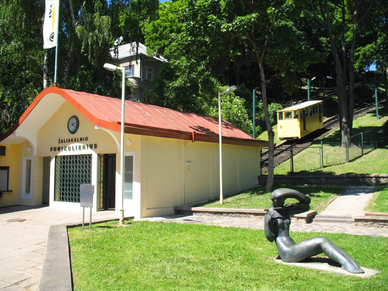 Žaliakalnio funikulierius, Kaunas.